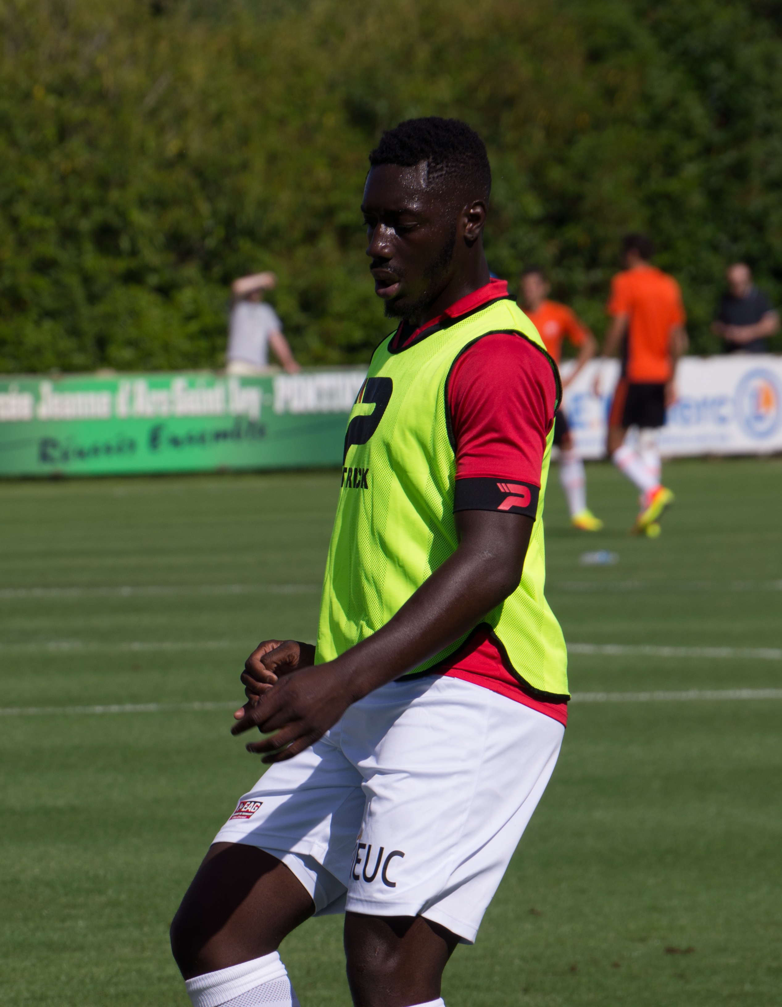 Alexandre Mendy le 24 juillet 2016